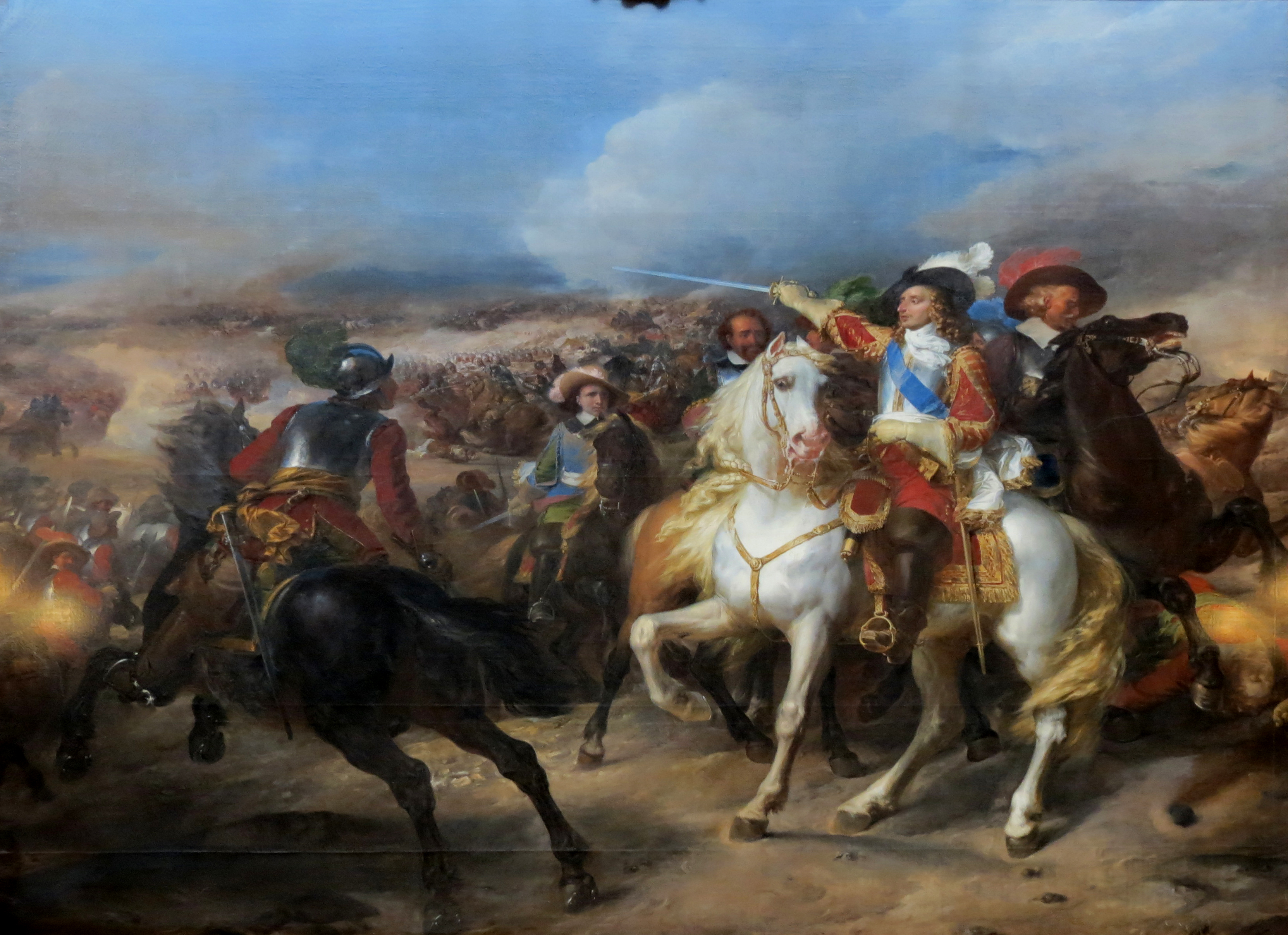 Bataille de Lens gagnée par le Grand Condé, 20 août 1648.